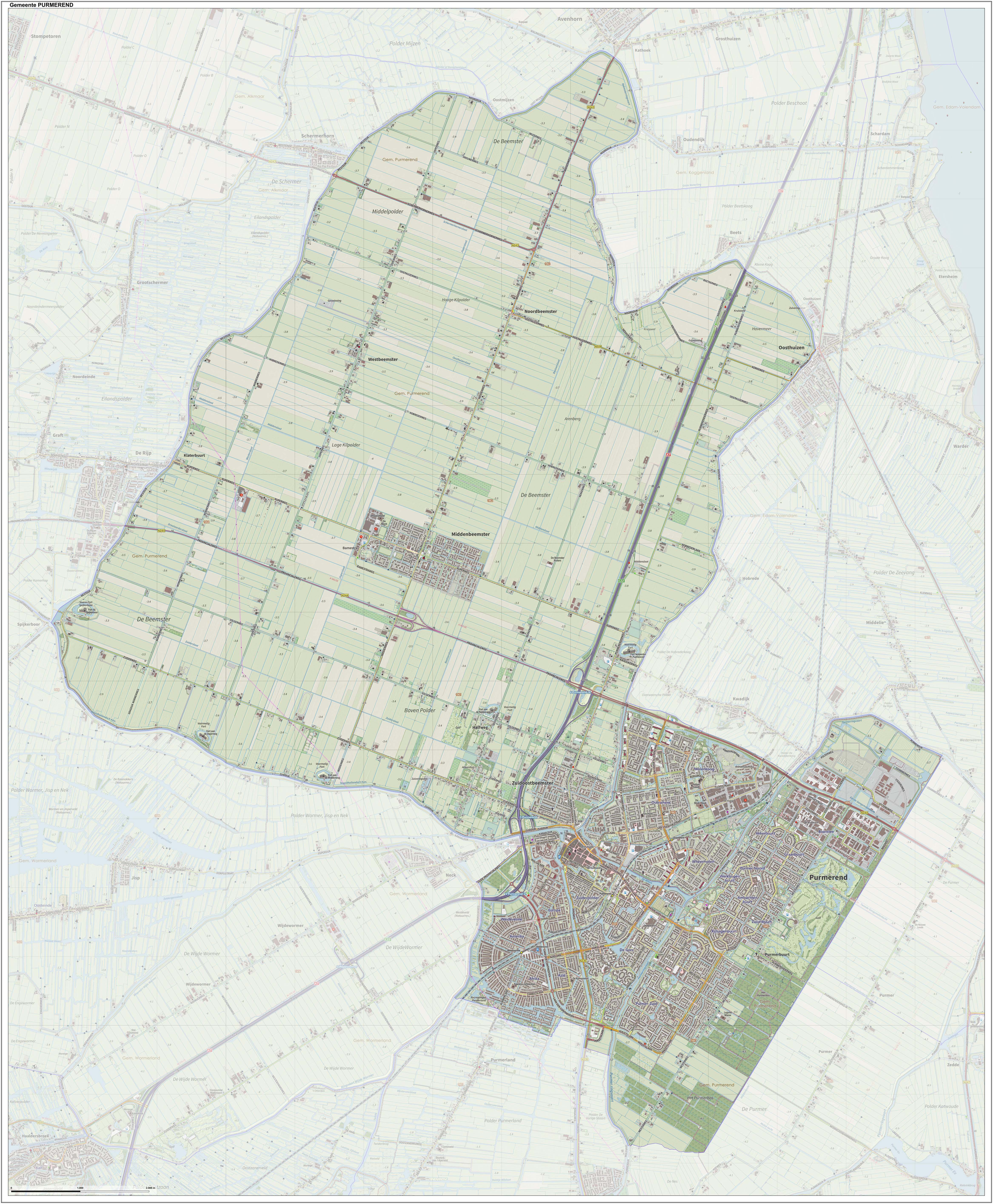 Topografische gemeentekaart. Resolutie: 400 pixels/km. Kaartbeeld samengesteld uit de open geodata van de Top10NL en Top25namen (Kadaster), Creative Commons-BY licentie. Gebouwvlakken uit open geodata BAG extract. Wegen uit de OpenStreetMap, OpenStreetMap community. Reliëfschaduw uit de Actuele Hoogtekaart AHN2. Samenstelling en kleurenschema: Jan-Willem van Aalst, met QGIS. Zie ook de Legenda.